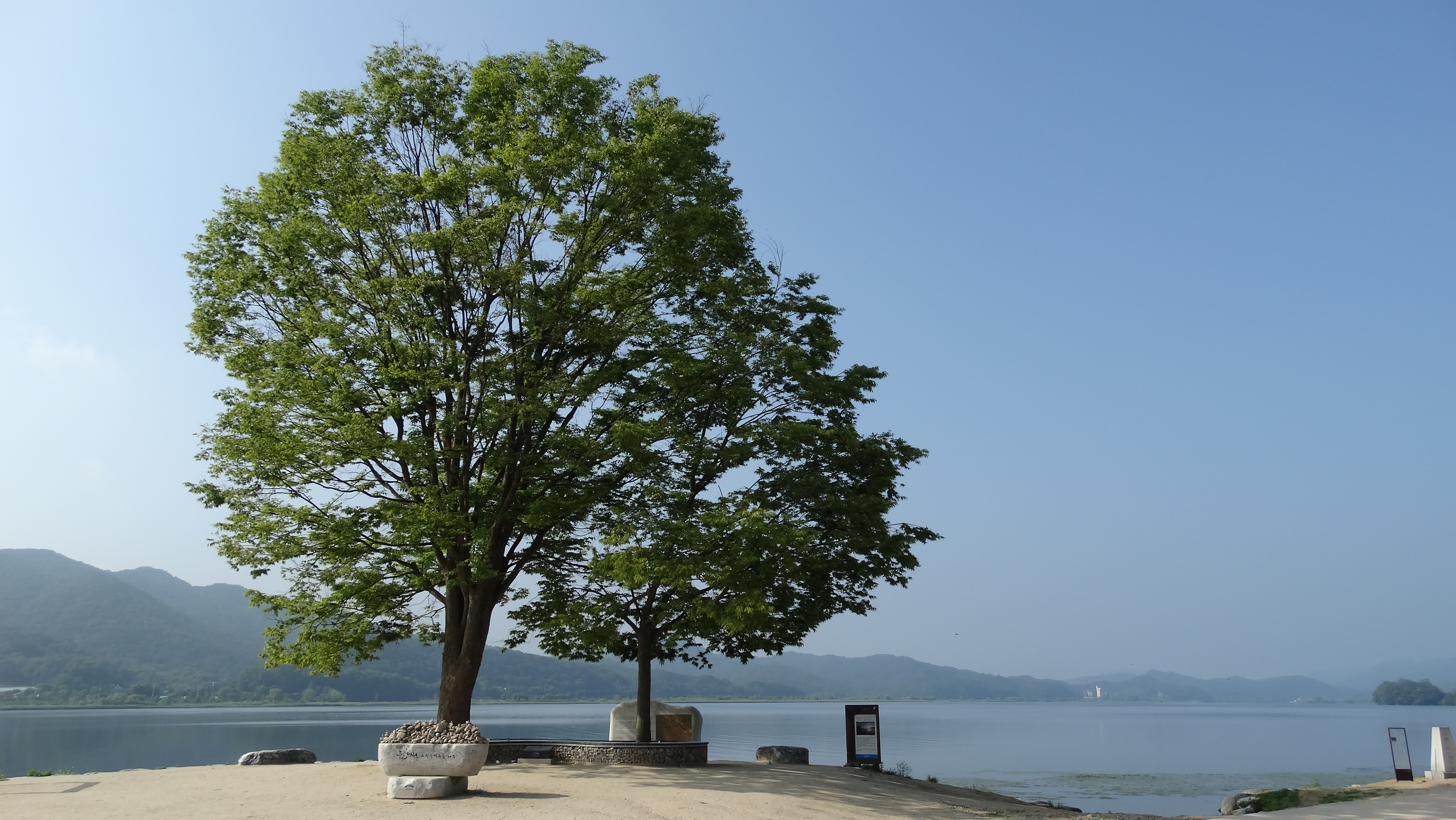 두물머리 (4)